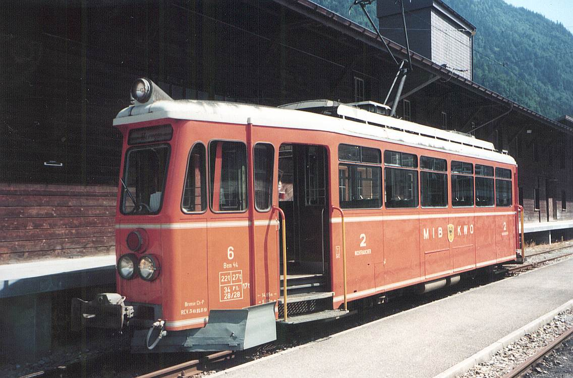 Description